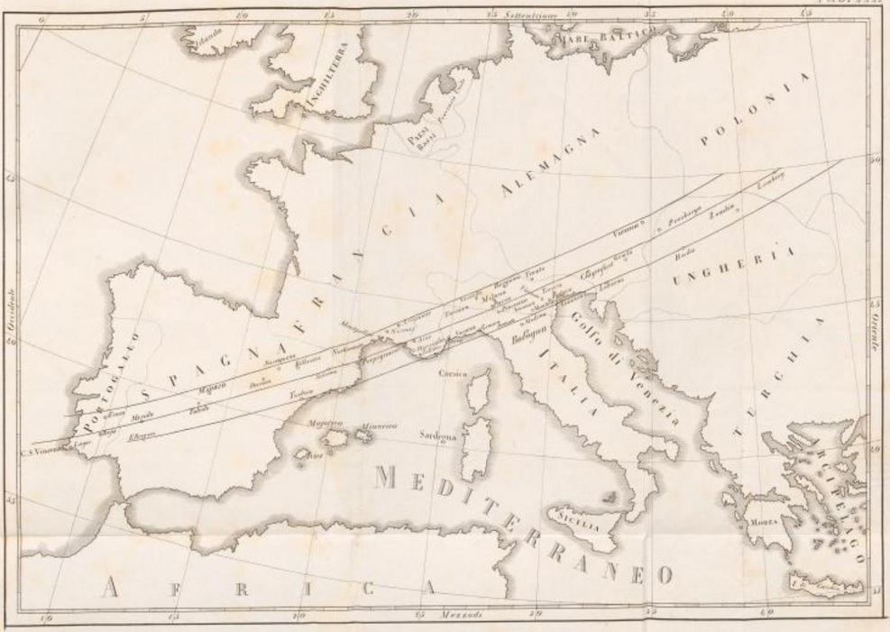 Gaetano Ceschi, Eclissi 08-07-1842 - Europa